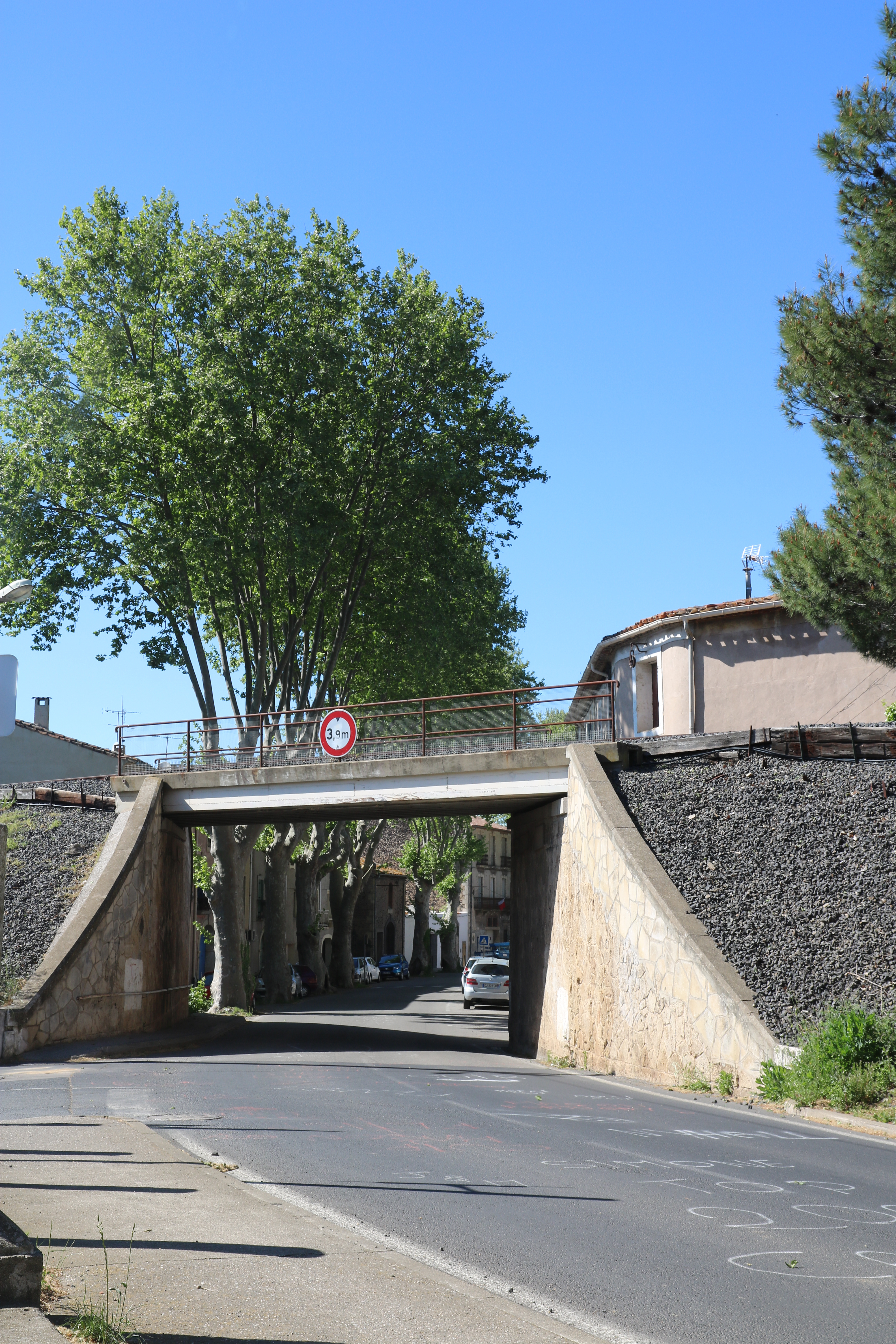 Saint-Thibéry (Hérault) - ancien pont ferroviaire, avenue d'Agde